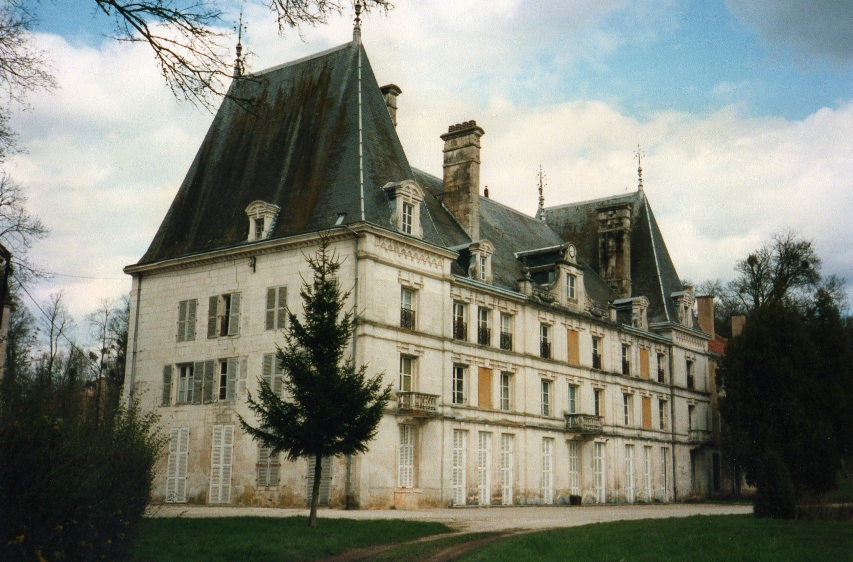 Château de Longuay construit sur un ancien bâtiment de l'abbaye